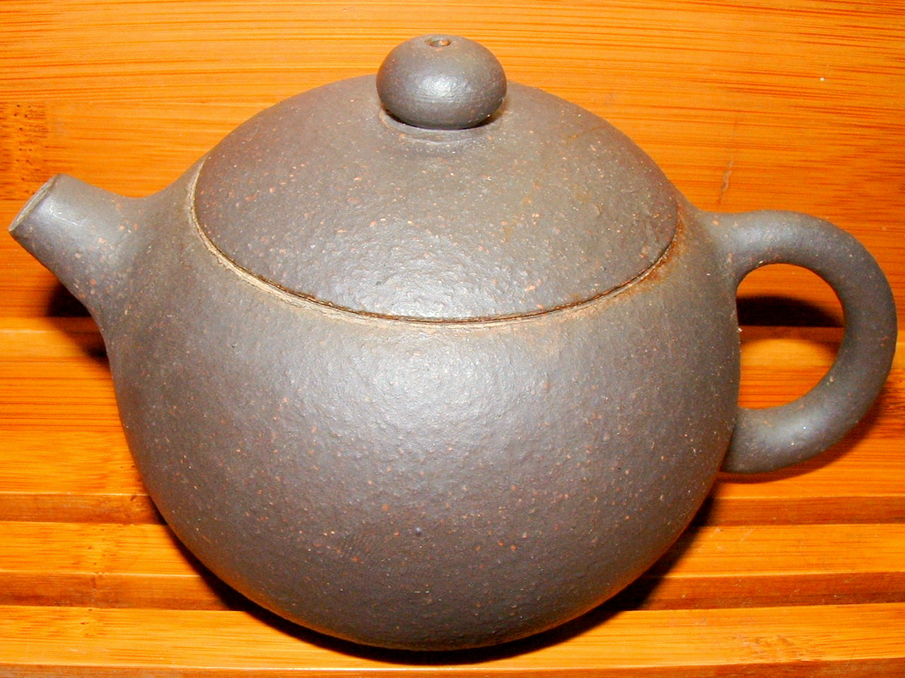 王亜琴作 宜興紫砂壺 『西施壺』 2003年江蘇省美術協会主催・「新人新作」展 三等賞受賞作品 Shizuha所有